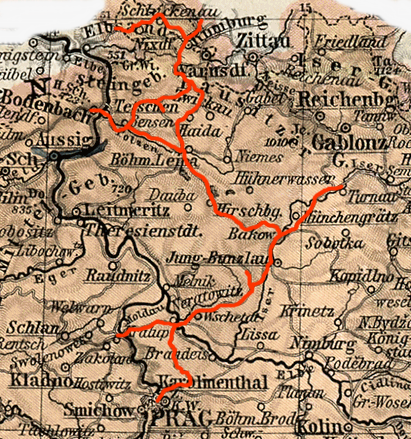 A Boehmische Nordbahn vonalhálózata